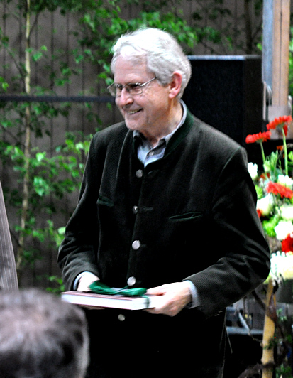 Peter Eitel bei einer Buchvorstellung